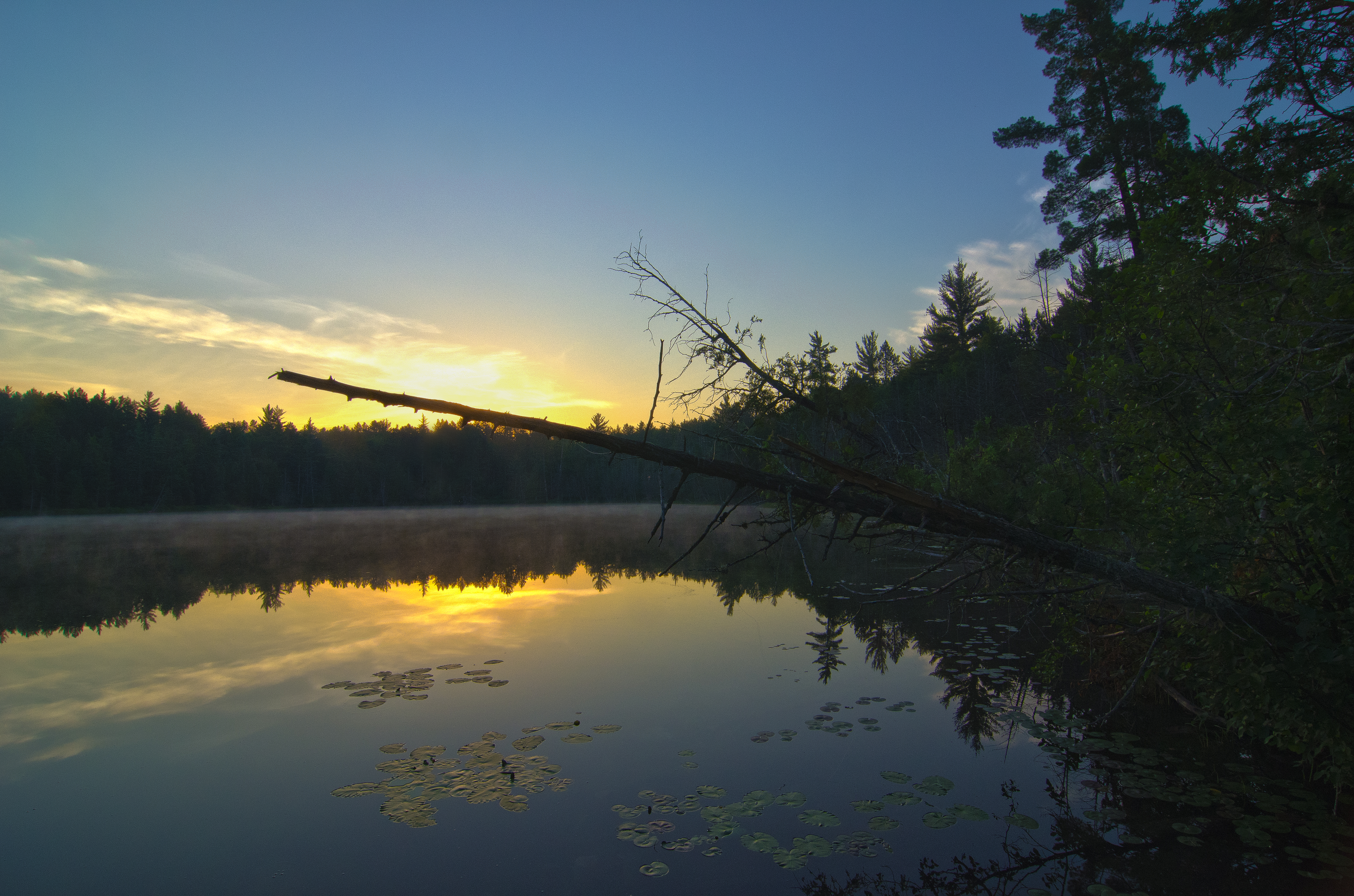 Bright Lake in Hartwick Pines State Park, Michigan